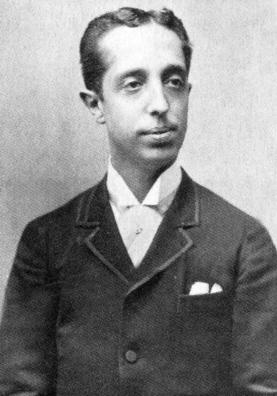 Eulogio I. Romero Salcedo (1866-?) abogado y político peruano. Fue Ministro de Gobierno (1904-1906), Ministro de Hacienda y Presidente del Consejo de Ministros (1908-1909). Fue también el primer Presidente del Directorio del Banco de Reserva del Perú] (1922-1930).